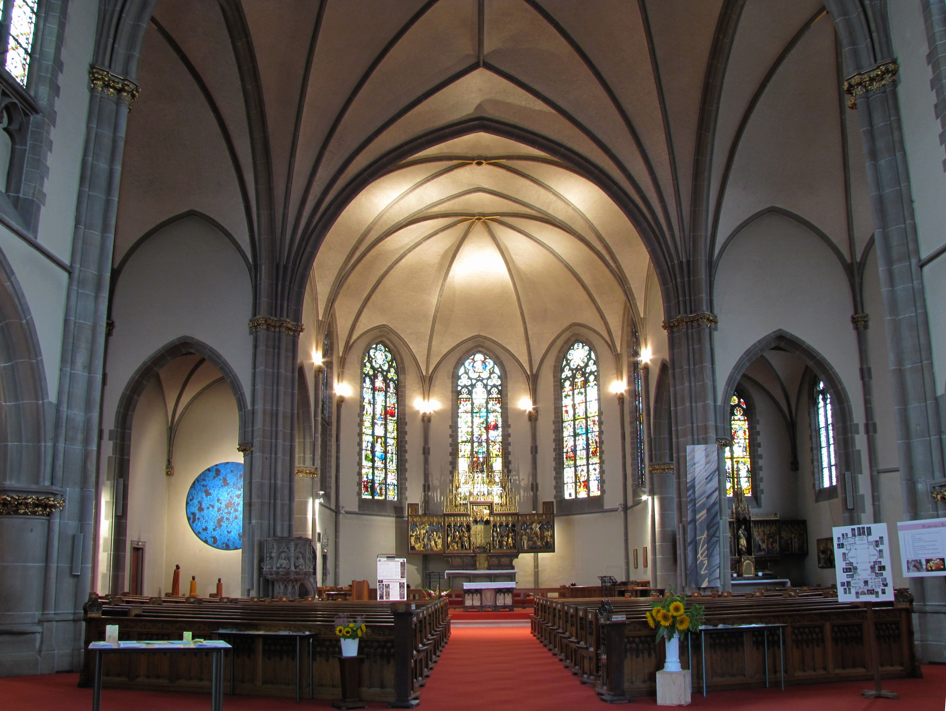 Alsace, Bas-Rhin, Église catholique Saint-Maurice (1899) de Strasbourg, avenue de la Forêt-Noire: Vue intérieure de la nef vers le chœur.